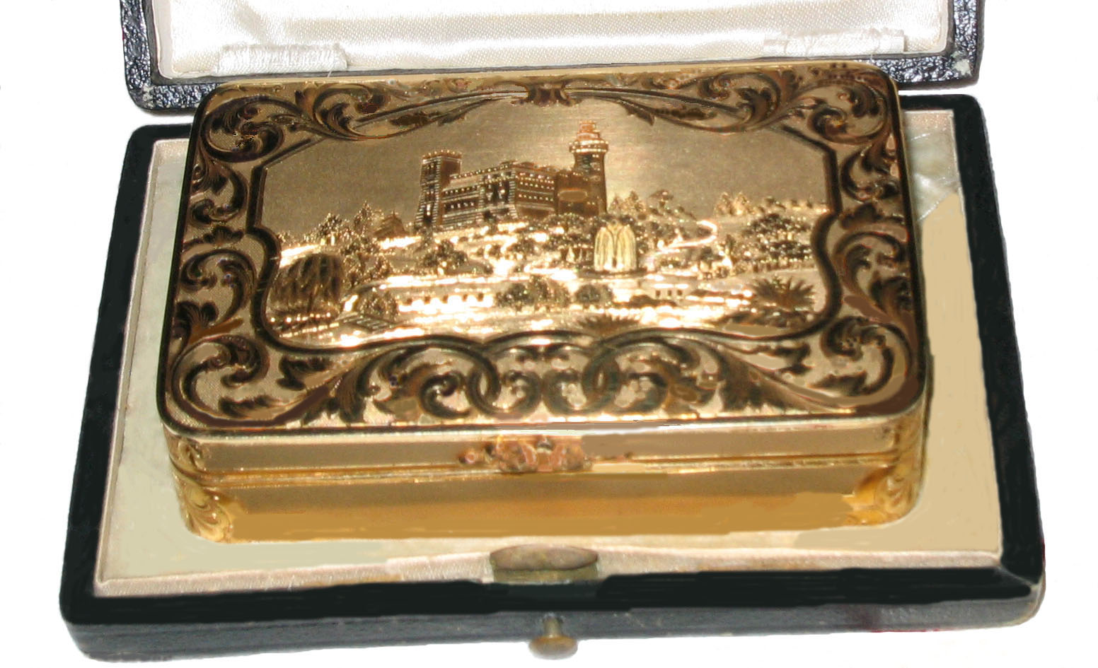 Facciata superiore della Tabacchiera d’oro donata da Vittorio Emanuele II a Vincenzo Cimorelli per averlo ospitato nella notte del 23 Ottobre 1860 nel Palazzo Cimorelli di Isernia prima di recarsi ad incontrare Garibaldi a Taverna Catena di Teano.